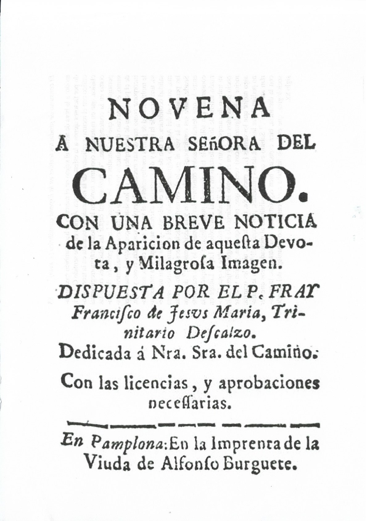 Novena a la Virgen del Camino, Pamplona, Viuda de Alfonso Burguete. ca. 1740